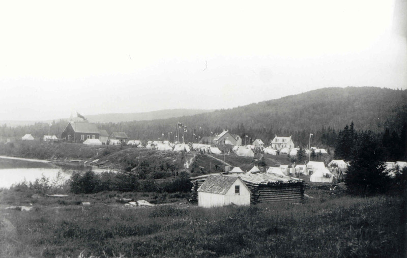 Le village de Weymontachie devient une réserve autochtone en Mauricie le 8 juin 1853